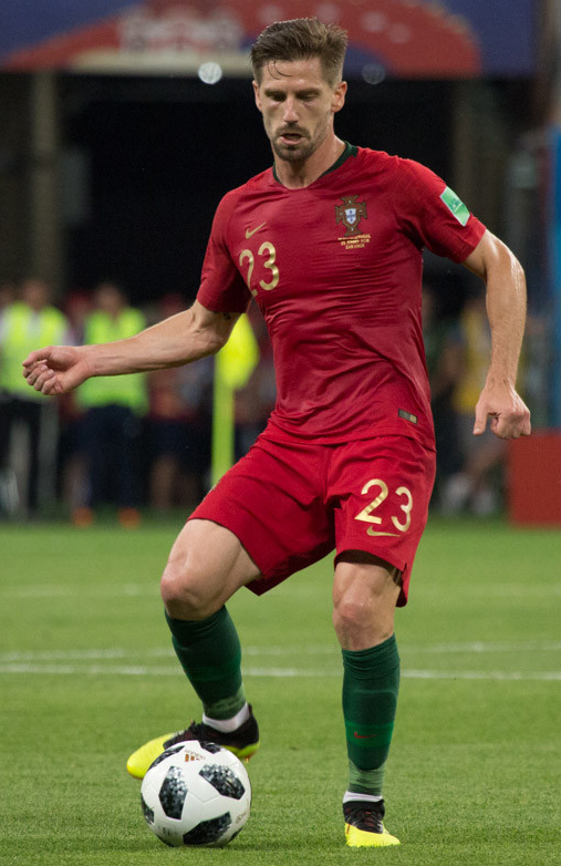 Гол на 93-й минуте и незабитый пенальти Роналду. Иран попортил нервы португальцам